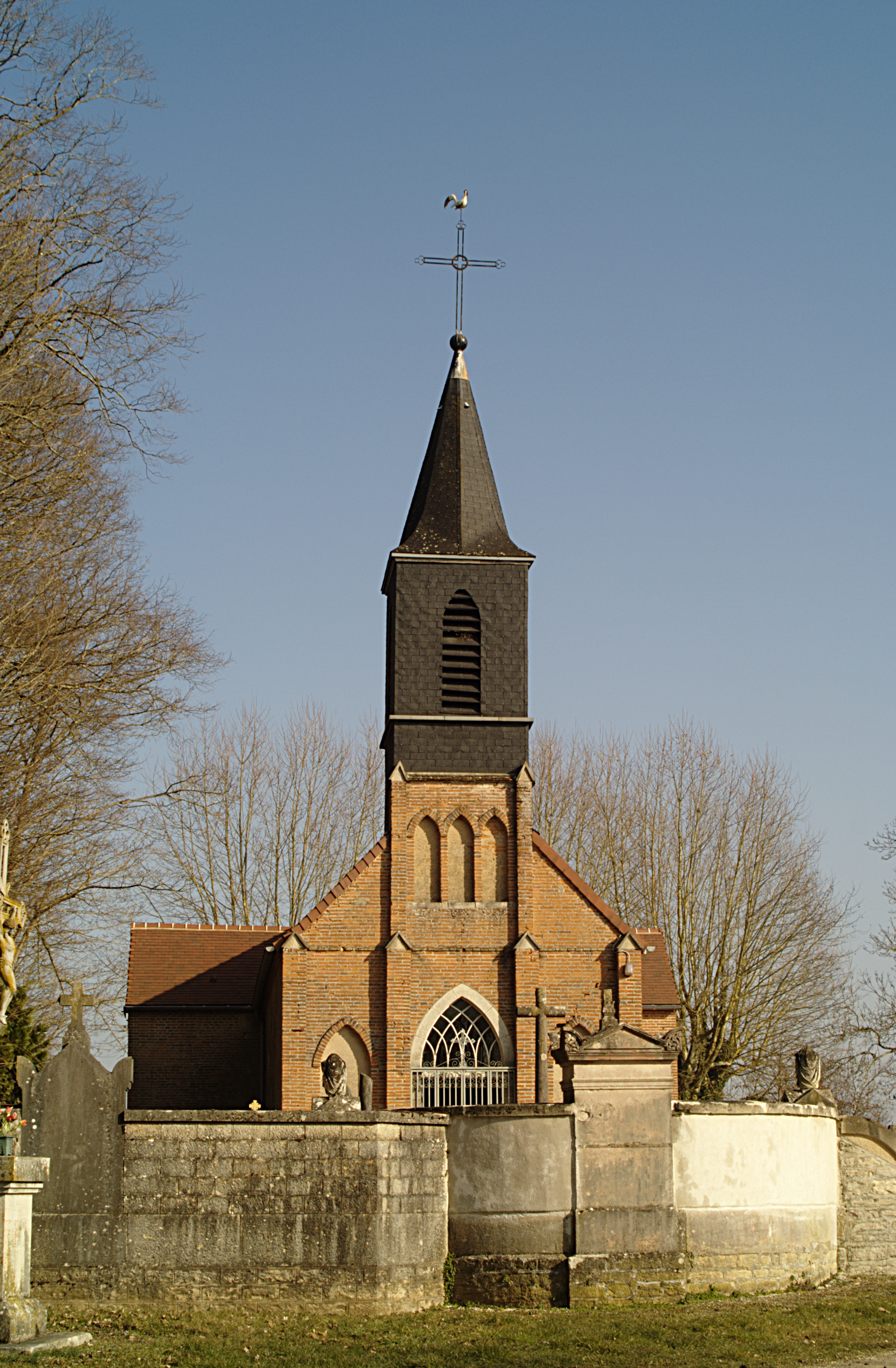 Église paroissiale Saint-Jacques-le-Majeur, Grosbois-lès-Tichey (Côte d'Or, Bourgogne, France)